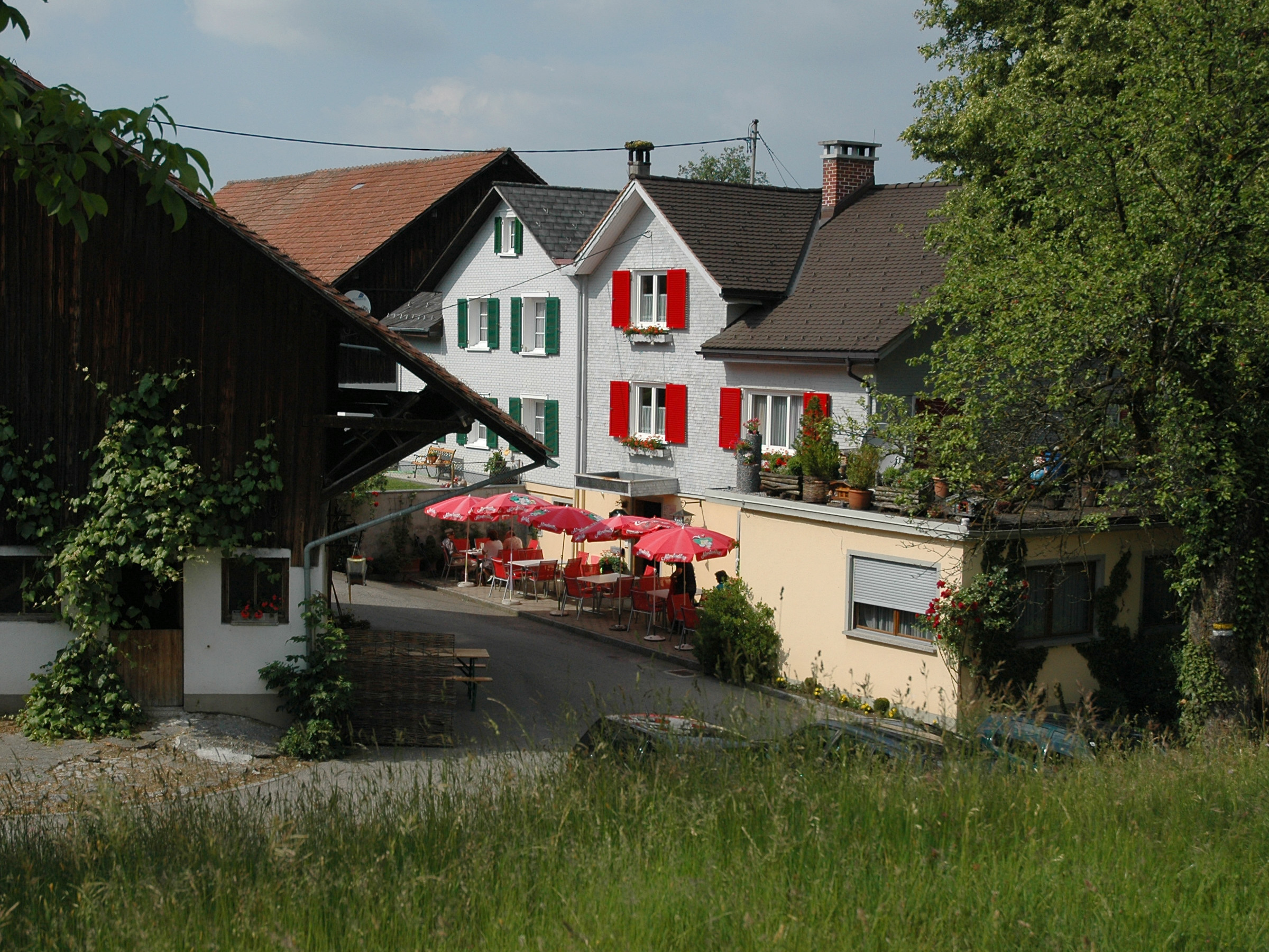 Gasthaus Auf der Egg (Fresch, Schellenberg)